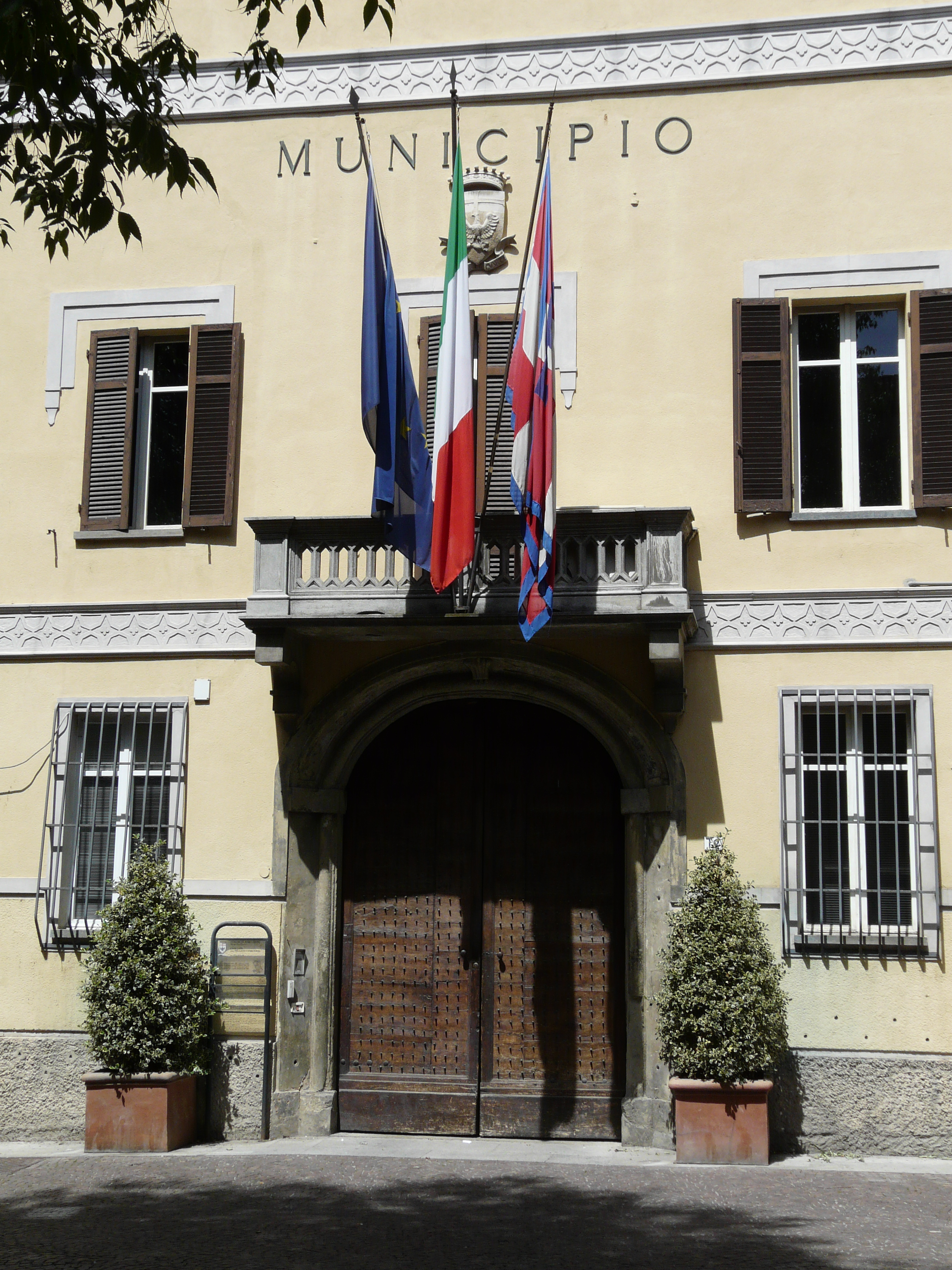 Palazzo municipale di Acqui Terme, Piemonte, Italia